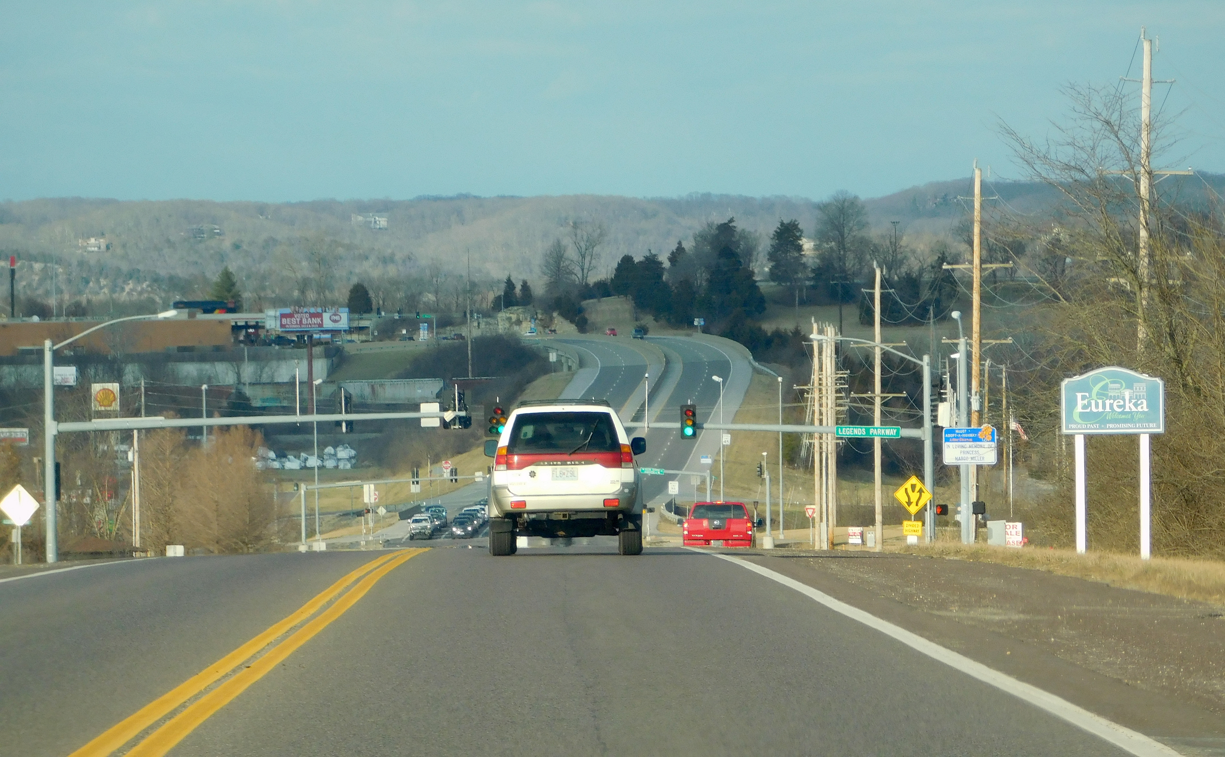 Missouri Route 109 - Eureka, Missouri.